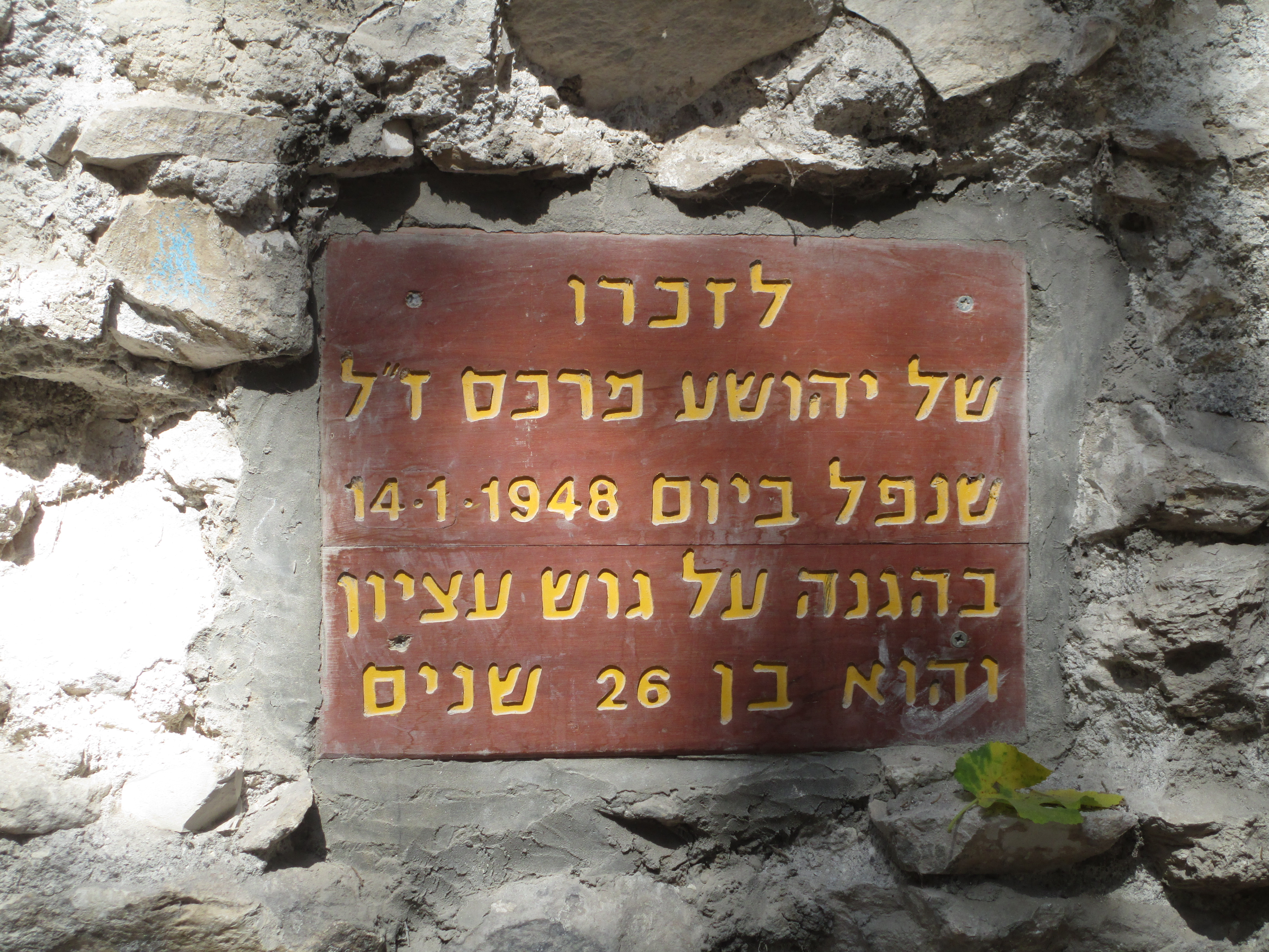 לוחית זיכרון ליהושע מרכס שנפל במלחמת העצמאות